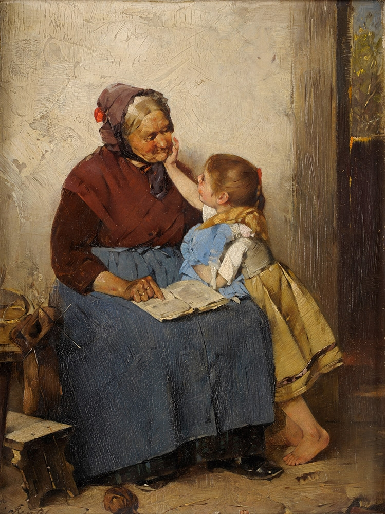 Großmama ist die Beste. Signiert. Öl/Holz, 24 x 17,5 cm